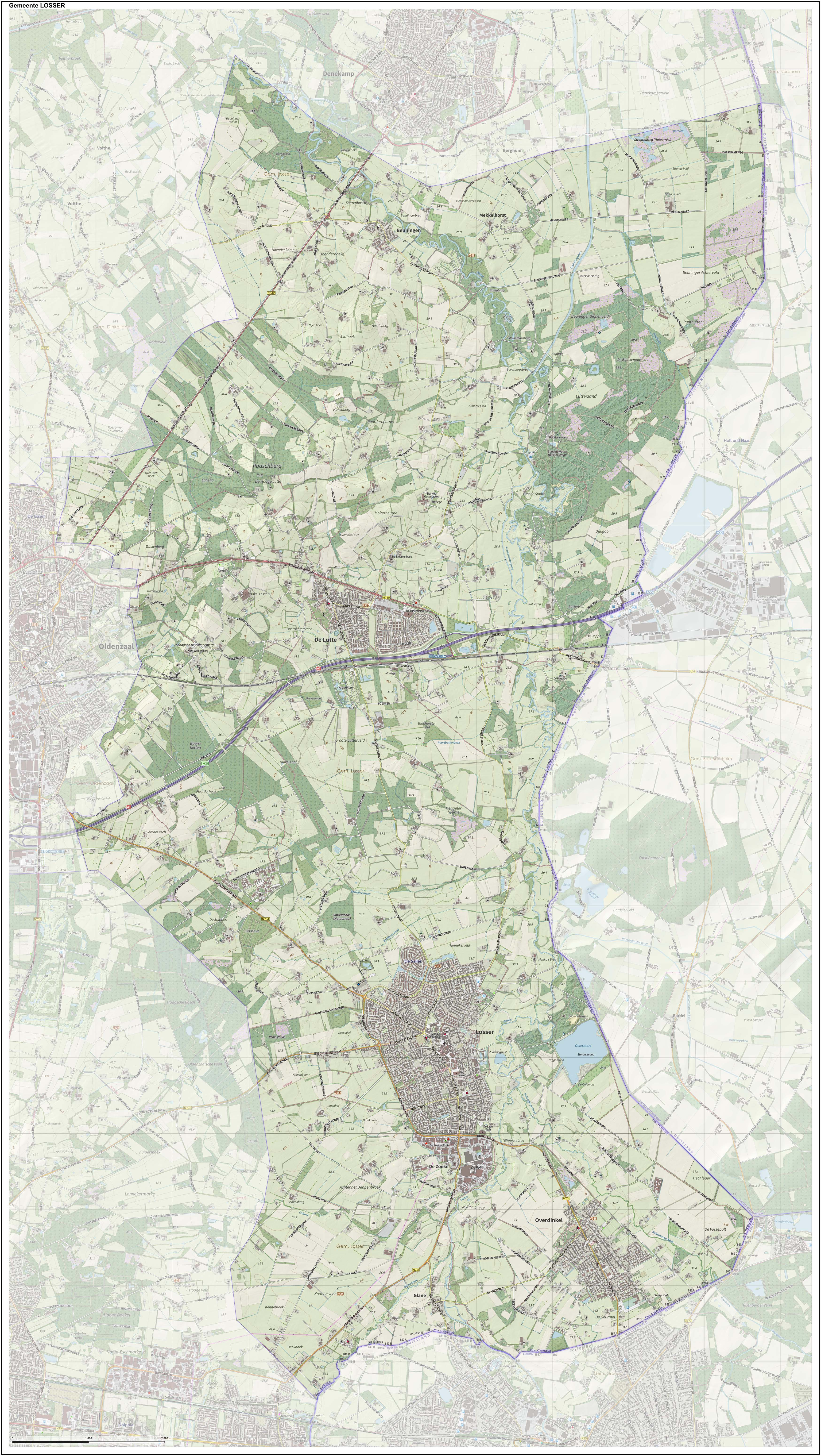 Topografische gemeentekaart. Resolutie: 400 pixels/km. Kaartbeeld samengesteld uit de open geodata van de Top10NL en Top25namen (Kadaster), Creative Commons-BY licentie. Gebouwvlakken uit open geodata BAG extract. Wegen uit de OpenStreetMap, OpenStreetMap community. Reliëfschaduw uit de Actuele Hoogtekaart AHN2. Samenstelling en kleurenschema: Jan-Willem van Aalst, met QGIS. Zie ook de Legenda.